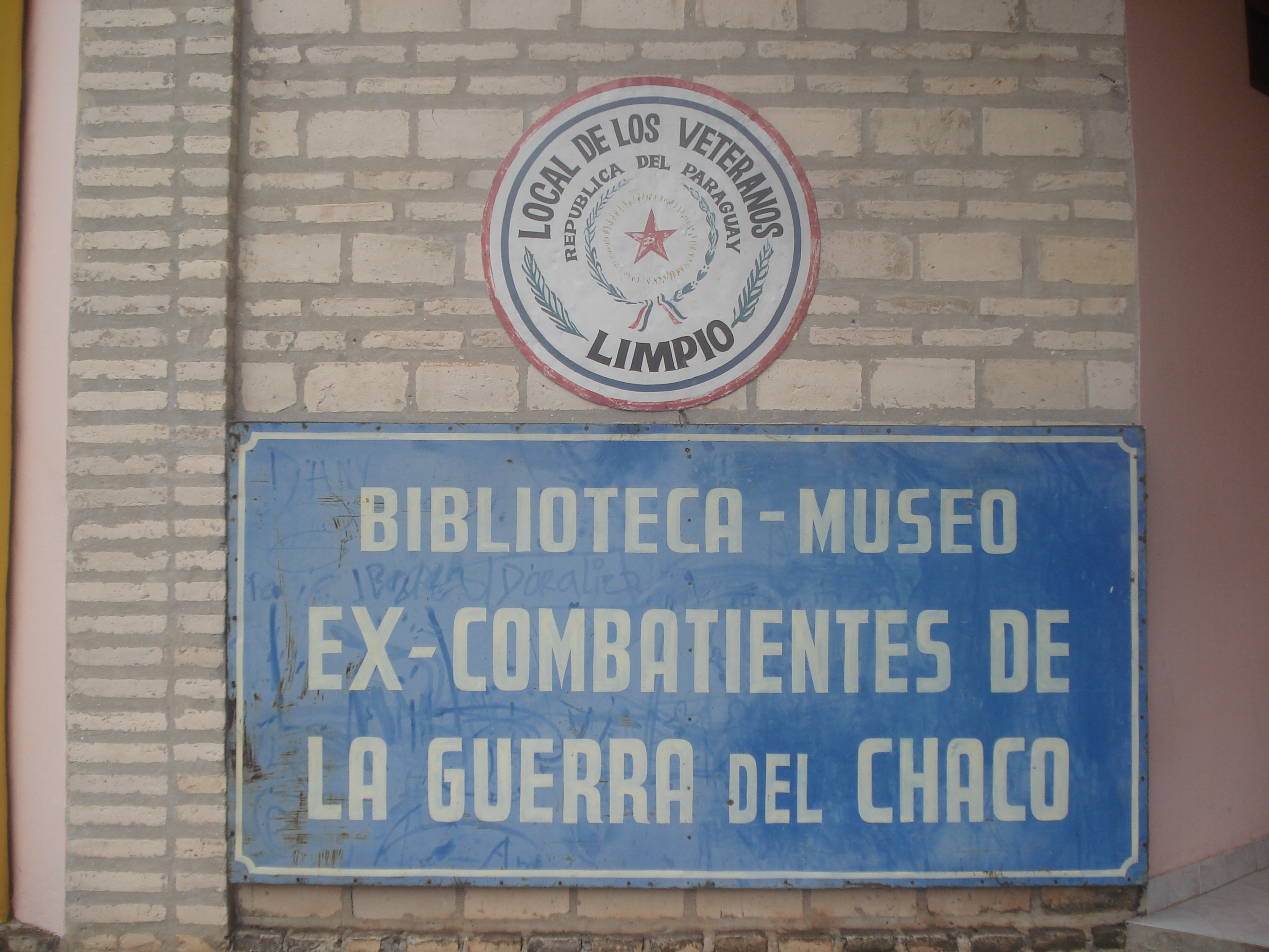 biblioteca